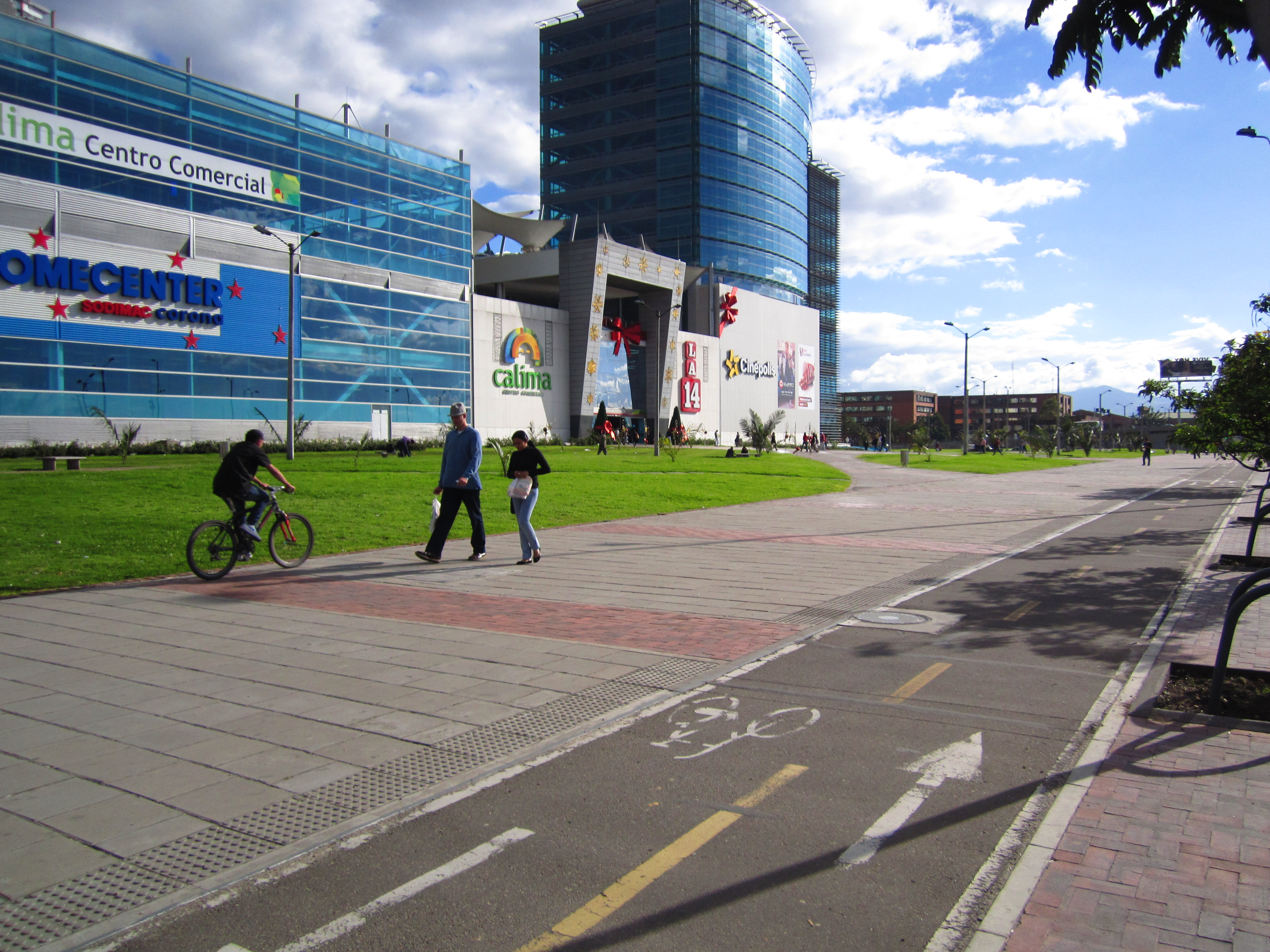 Ciclorruta frente al centro comercial Calima en Bogotá.